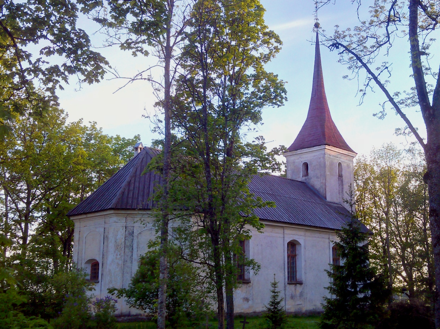 Anna kirik